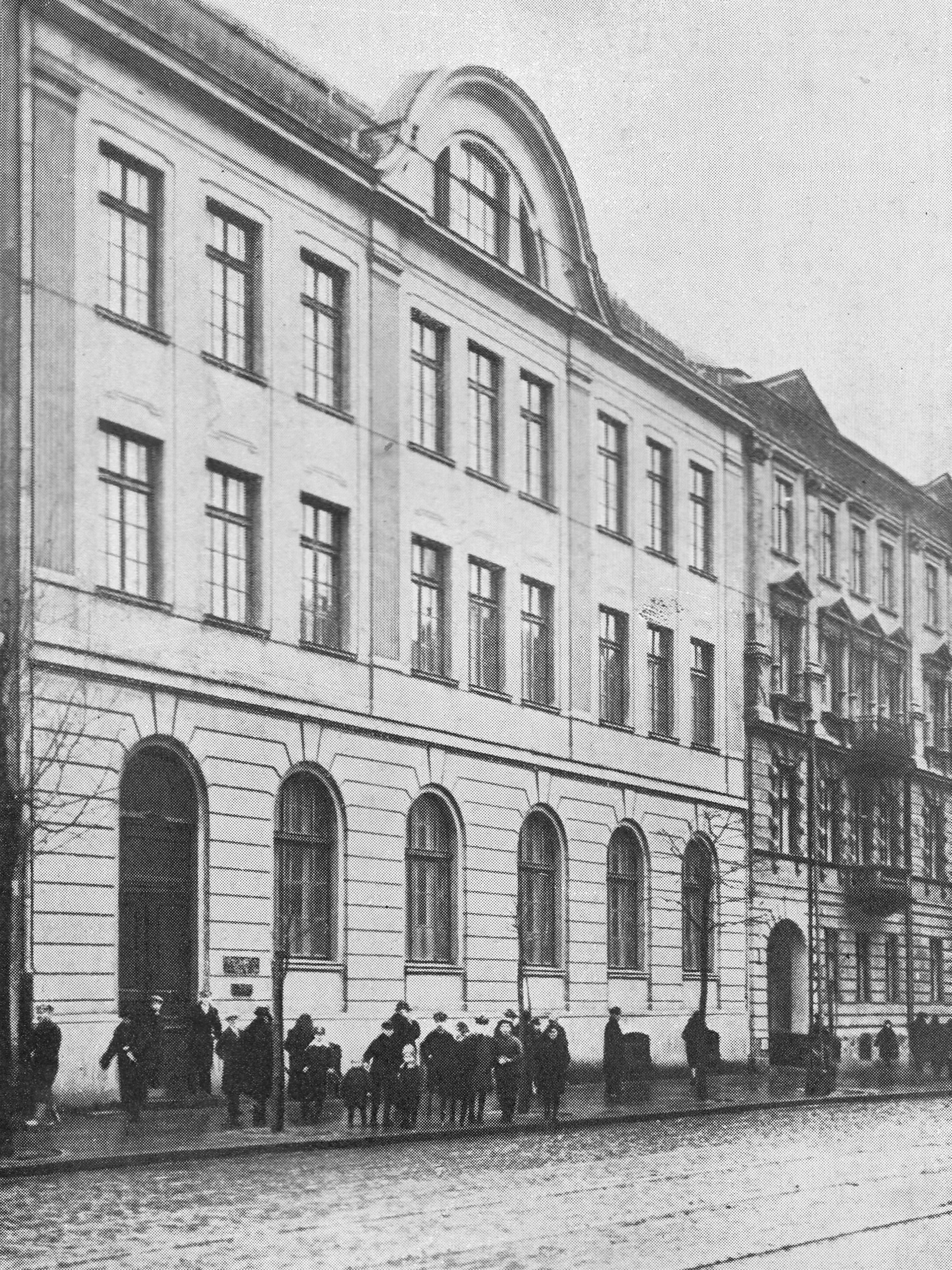 Budynek Państwowej Szkoły Handlowej Męskiej im. J. i M. Roeslerów w Warszawie przy ul. Chłodnej 33